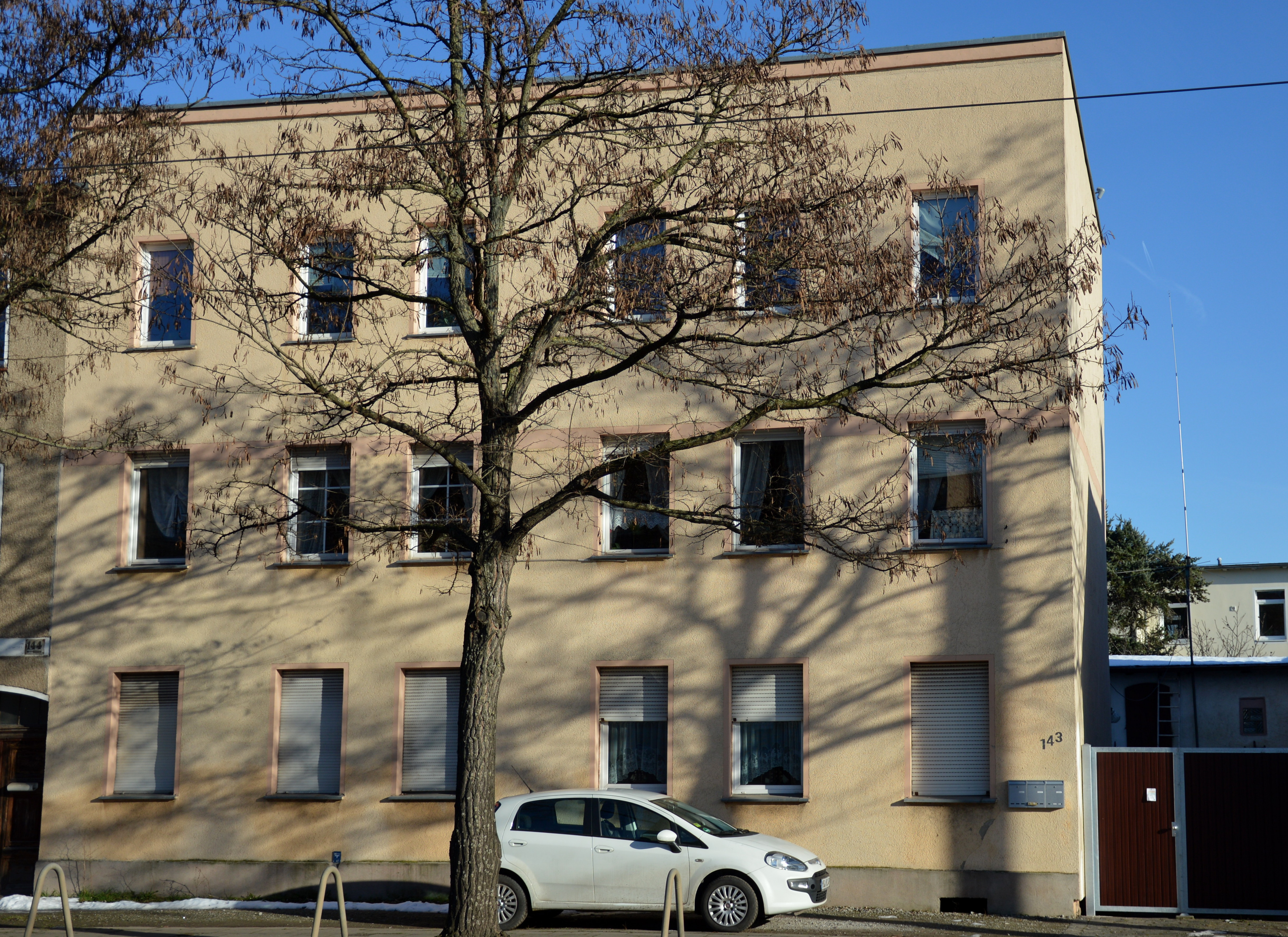 Haus Alt Westerhüsen 143 in Magdeburg